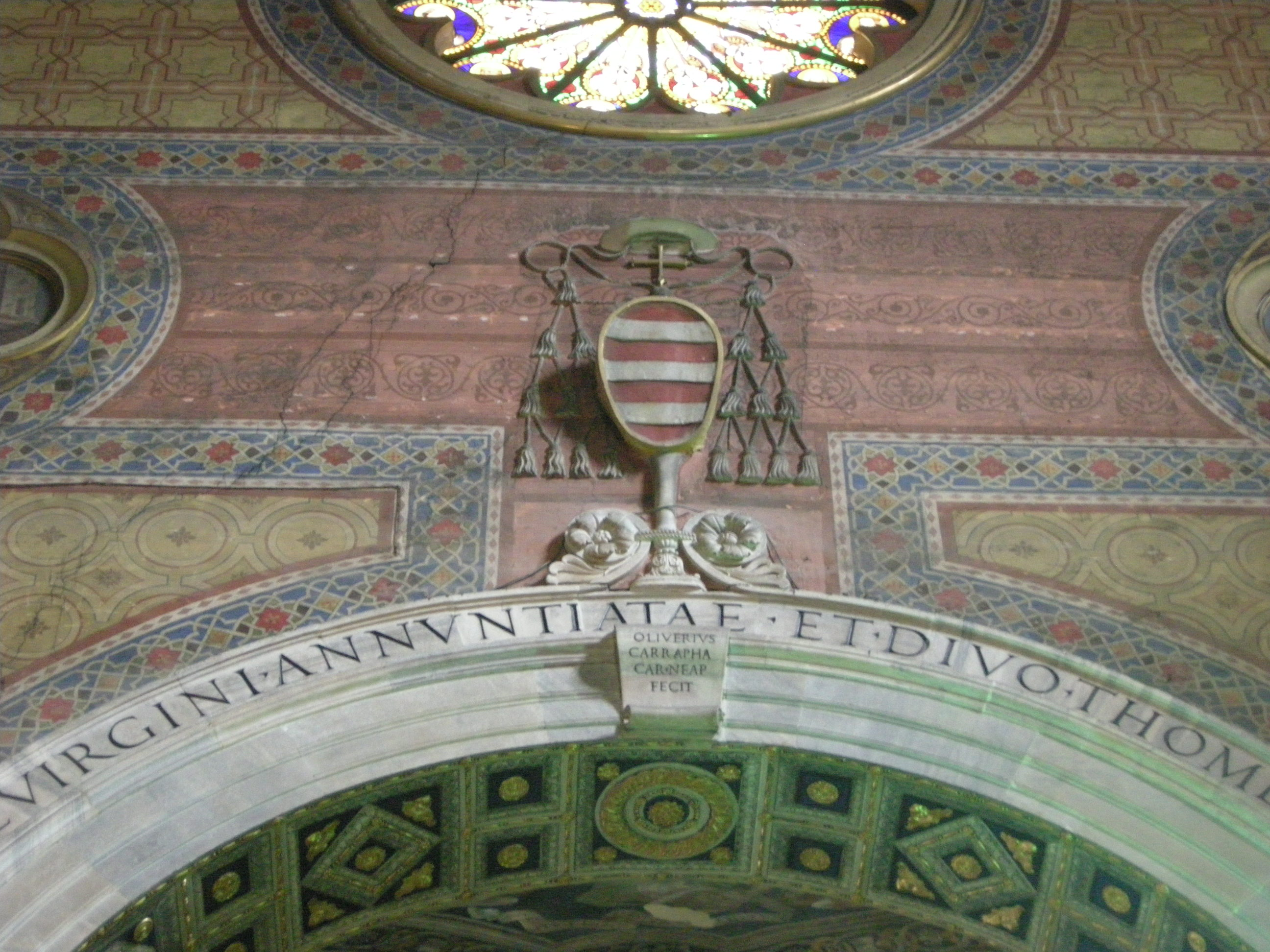 Cappella carafa